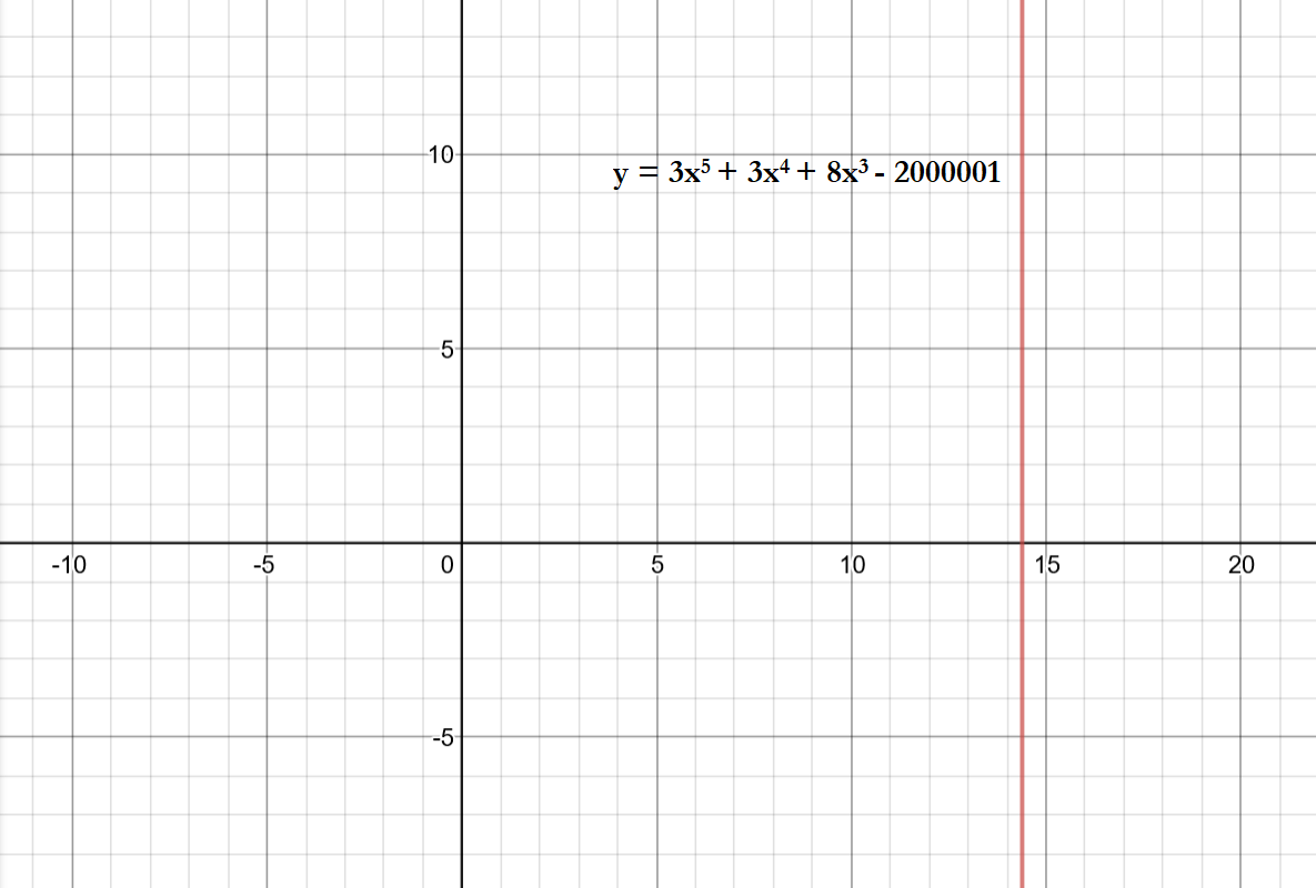 中文（香港）: 以二維坐標系統圖表示的毅進制 3 x 5 + 3 x 4 + 8 x 3 = 2000001 {\displaystyle 3x^{5}+3x^{4}+8x^{3}=2000001} 五次方程。